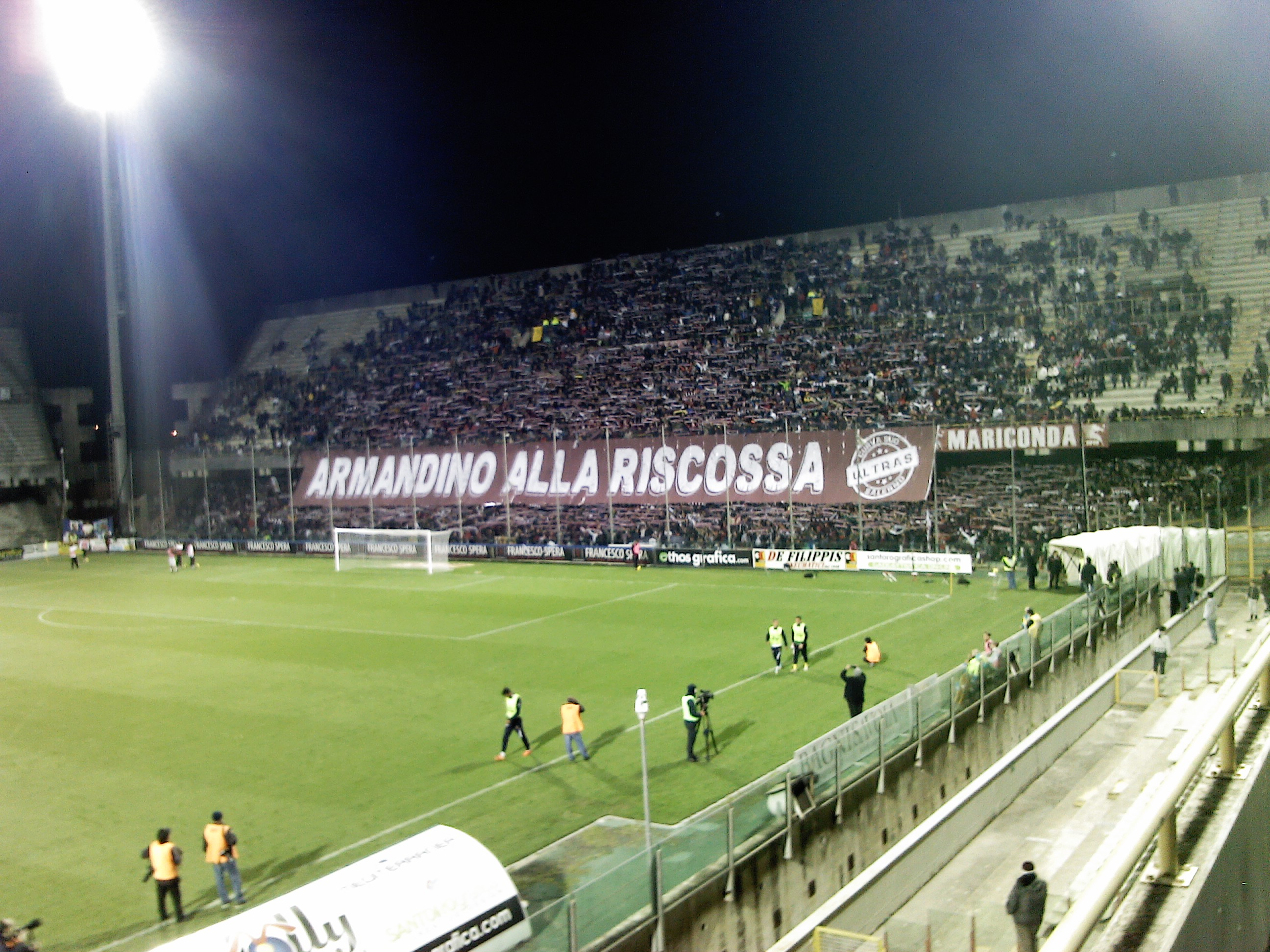 2014-15, gara di Lega Pro contro il Lecce all'Arechi